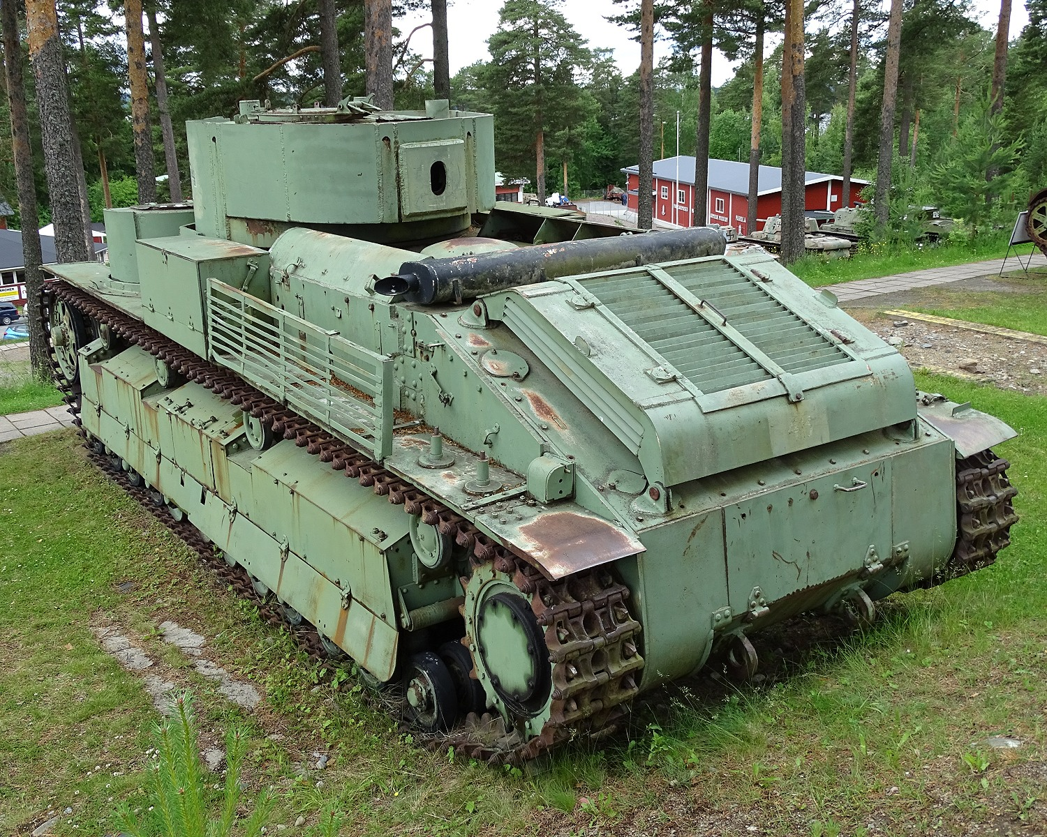 159 - T-28 m 1938